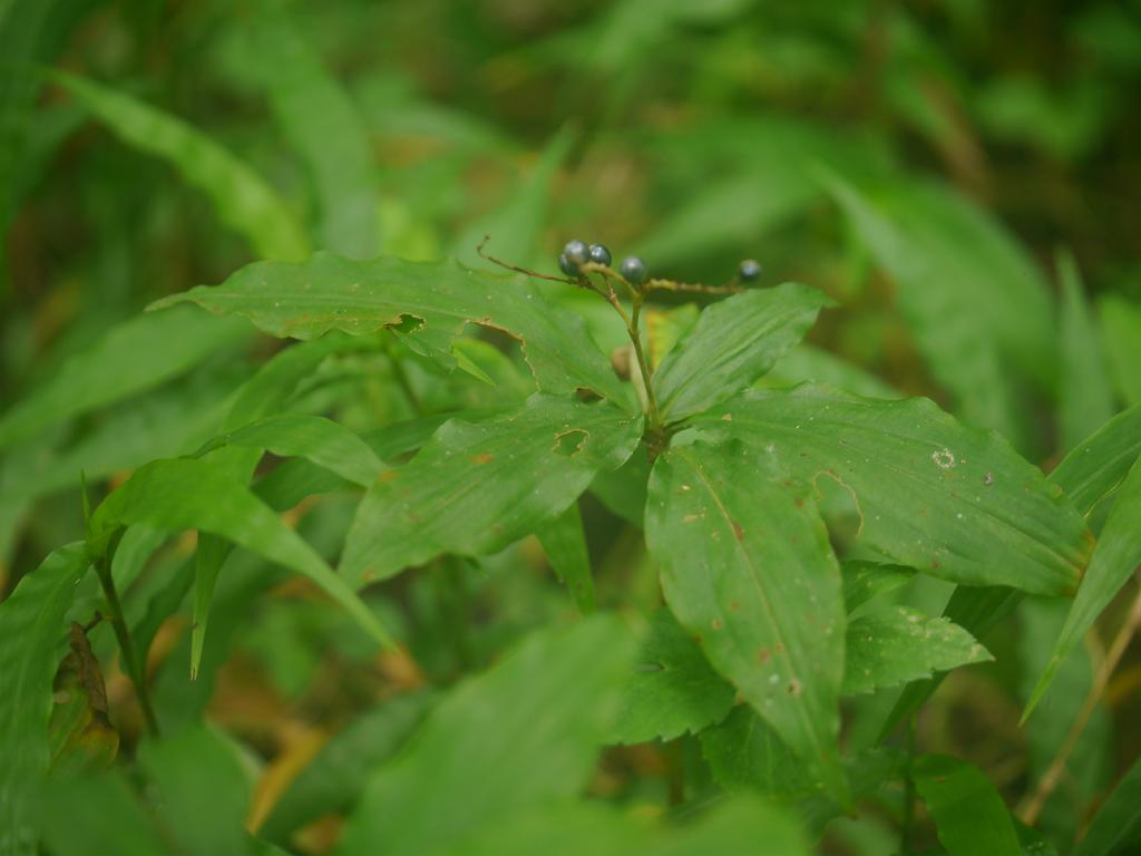 2015/08/26 沖縄本島：Okinawa Island, Japan